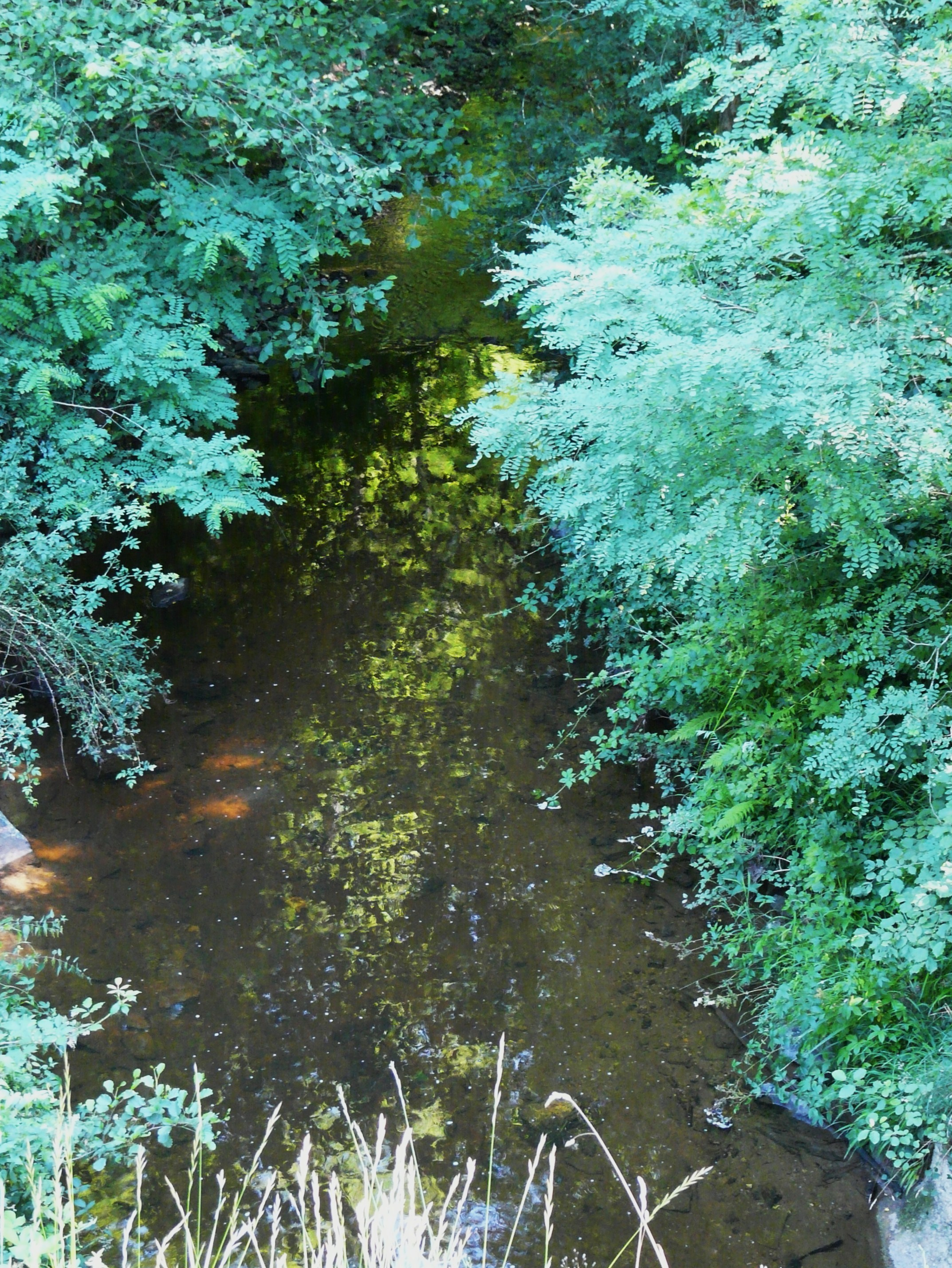 Ruisseau le Touroulet en aval du pont de la route départementale 77 près du lieu-dit Javanaud, Saint-Jory-de-Chalais, Dordogne, France